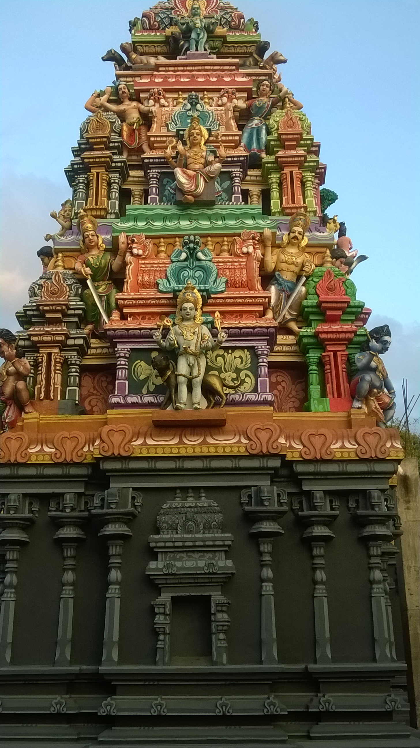 சிறிய கோபுரம்